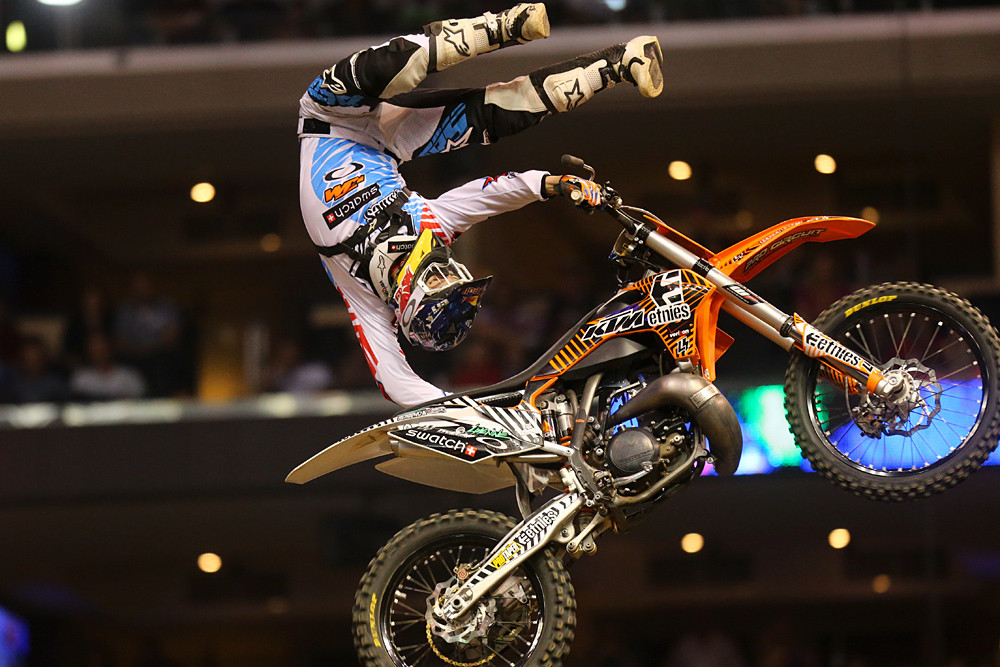 Los Angeles 2013